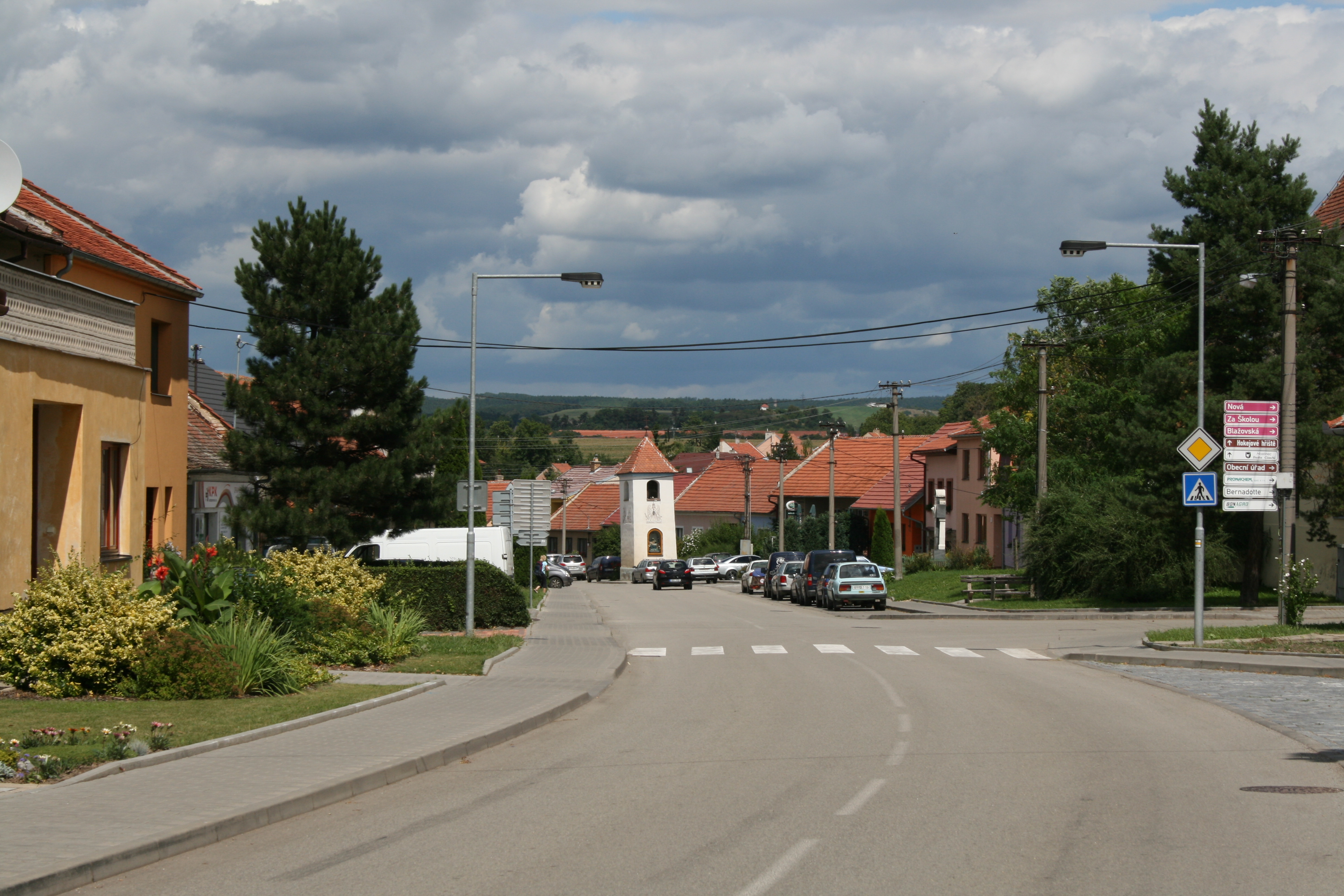 Náves v Jiříkovicích, okres Brno-venkov. Pohled z jihu.